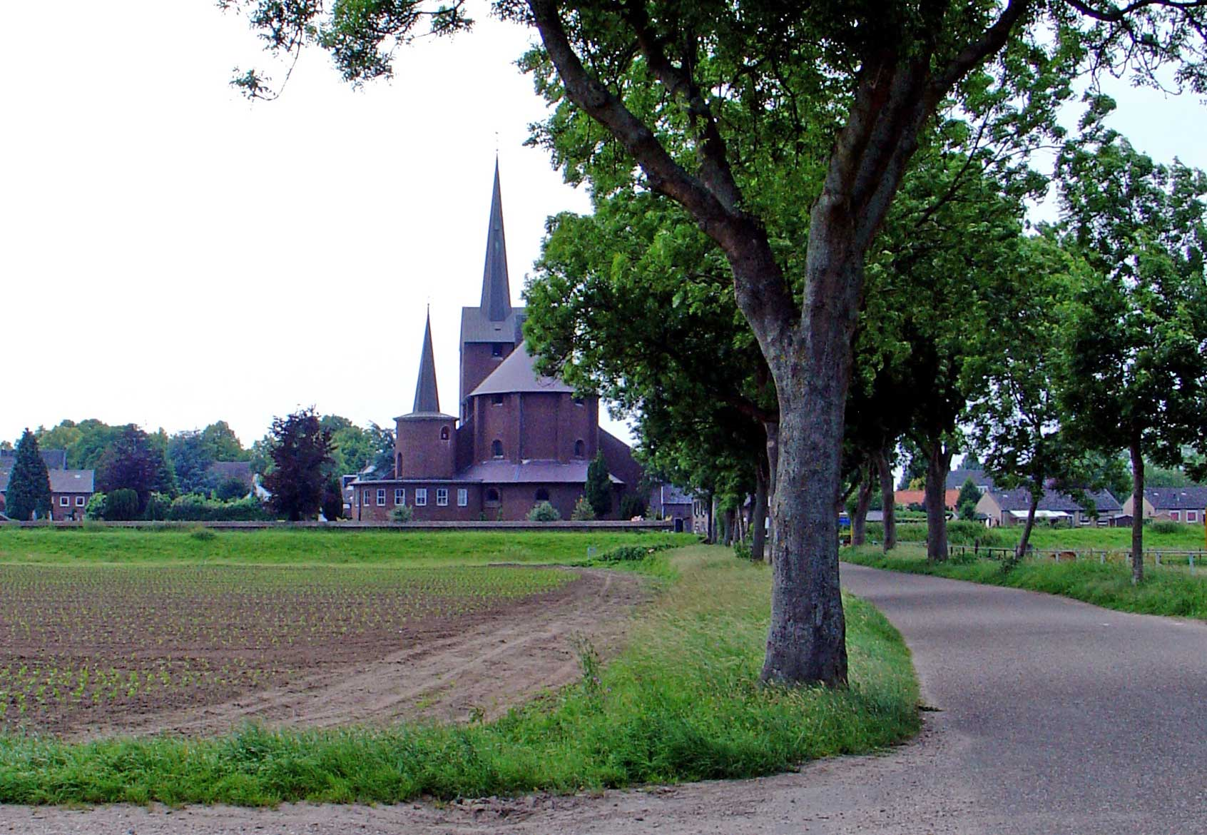 O.L. Vrouw Tenhemelopnemingkerk in Grubbenvorst (Limburg)